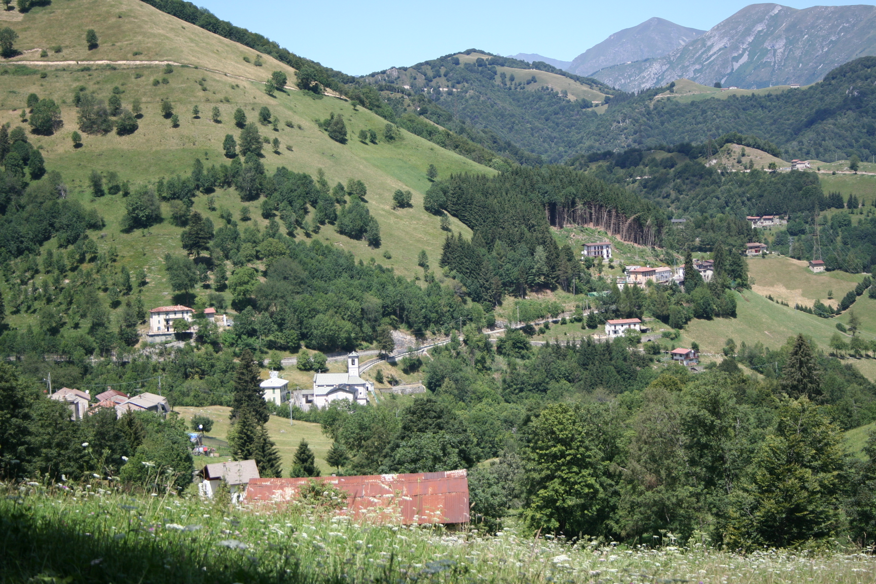 Morterone (27 ab. al 5 aprile 2017) in provincia di Lecco, il comune più piccolo d'Italia per numero di abitanti.